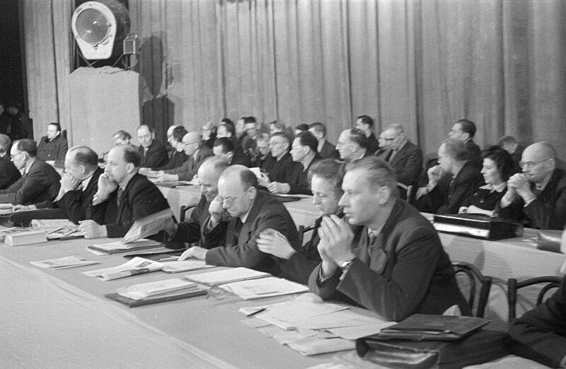 Original image description from the Deutsche Fotothek Admiralspalast, Deutsche Staatsoper Berlin & Gebäude der russischen Kommandantur in Berlin-Pankow